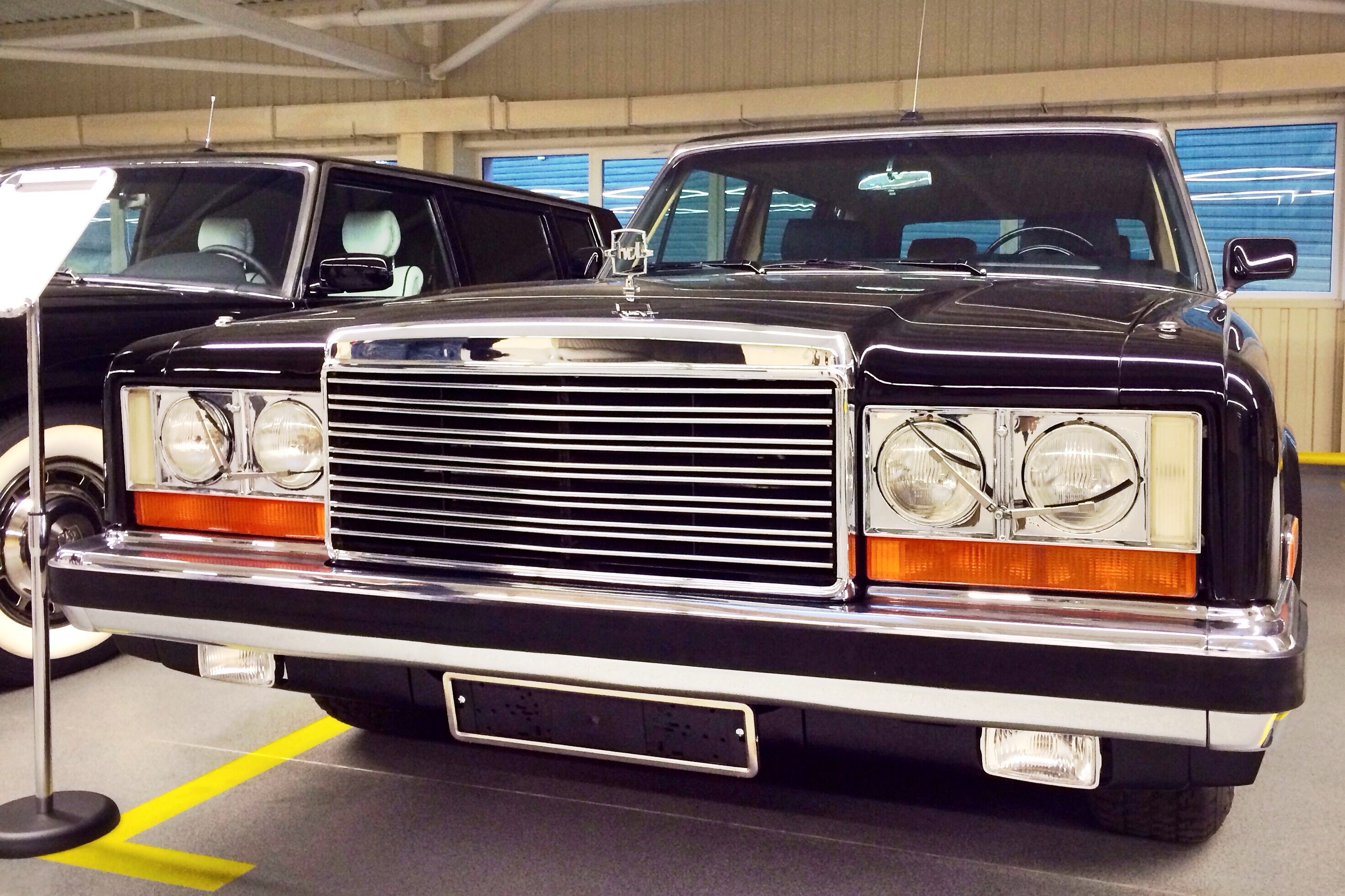 ЗИЛ-41045 в Межигорье